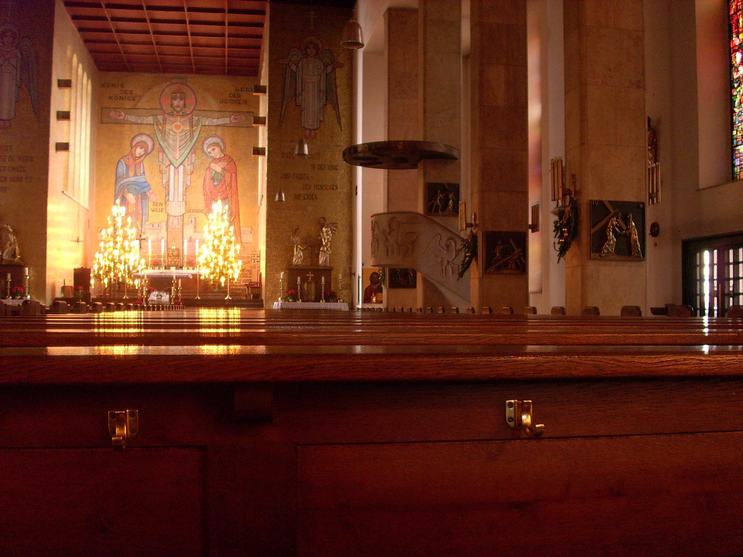 Blick zum Mosaik-Altarbild und zum Josefsaltar in der Herz-Jesu-Kirche (Weiden in der Oberpfalz), Deutschland.